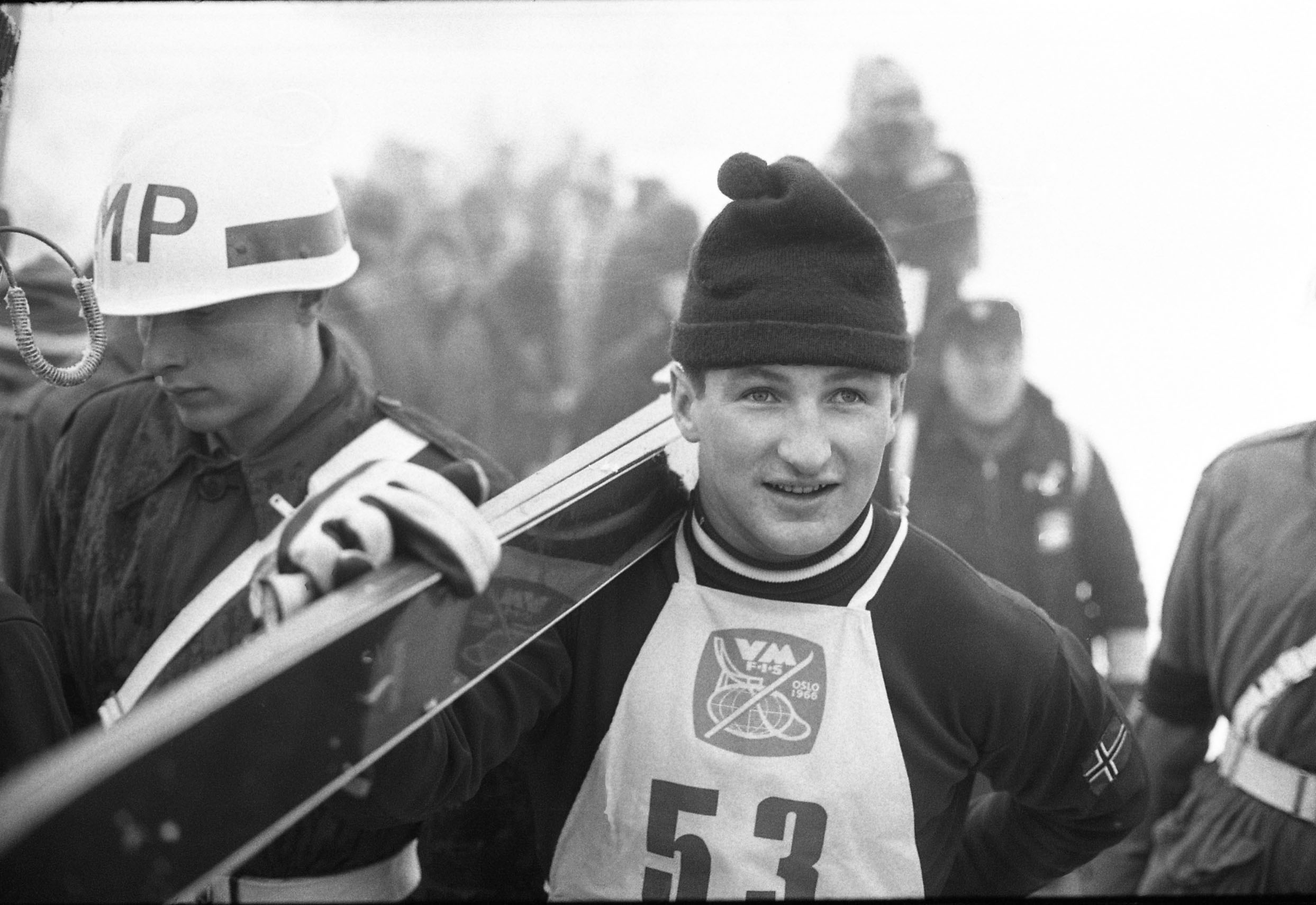 Beskrivelse: Bjørn Wirkola tok gull, japaneren Takashi Tutisawa sølv og Kjell Sjöberg bronse i hopp, stor bakke, Holmenkollen, verdensmesterskapet i Oslo 1966 Fotograf: Billedbladet NÅ/van Deurs Sted: Oslo År: 1966 Arkivreferanse: RIKSARKIVET- RA/PA/0797/U/Ua/3908_2b_033_edited-1